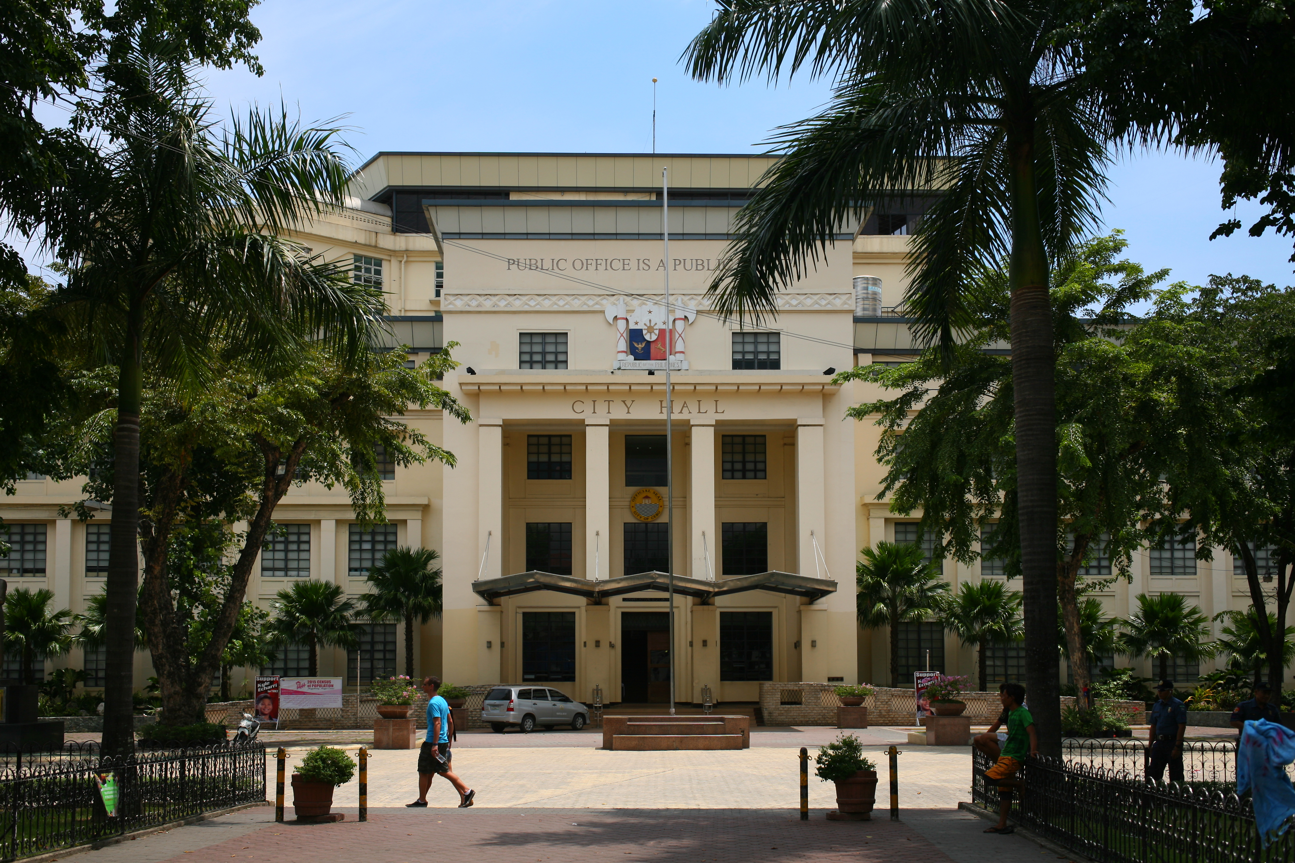 Municipio di Cebu, Filippine